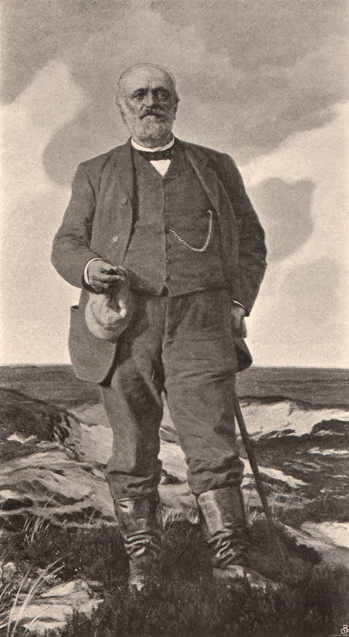 Enrico Mylius Dalgas (16. juli 1828 - 16. april 1894), dansk officer og vejingeniør.